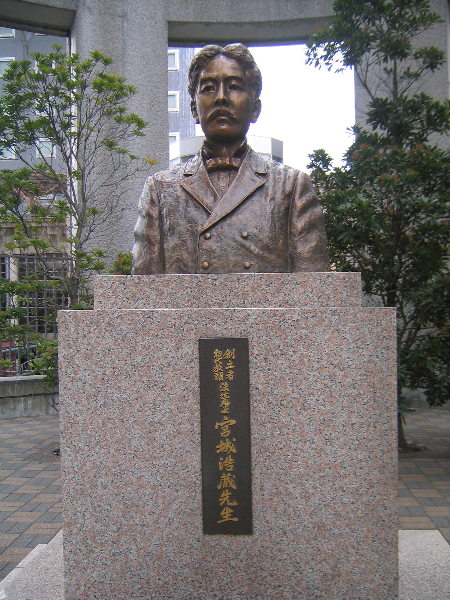 明治大学駿河台キャンパスに立つ宮城浩蔵胸像